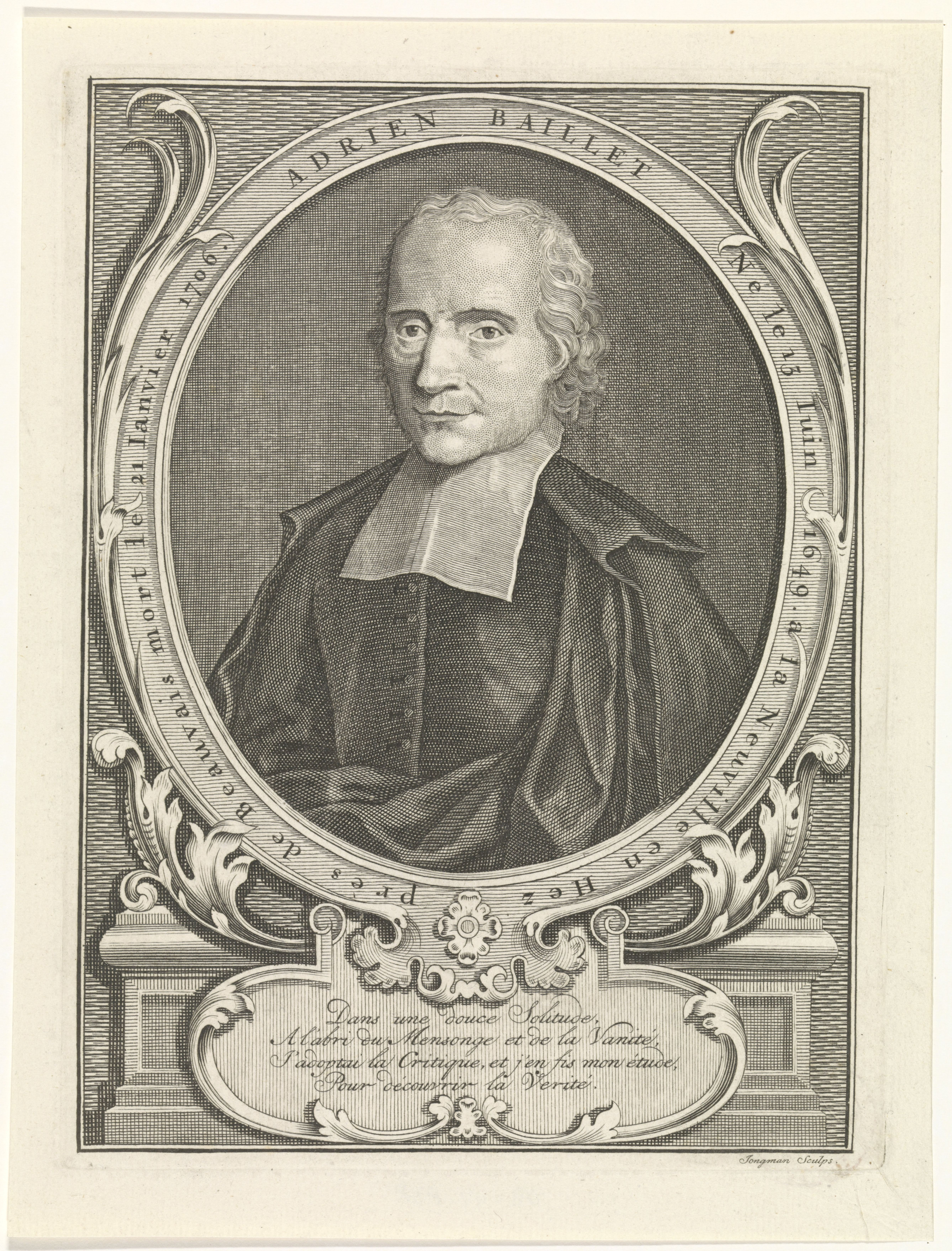 IdentificatieTitel(s): Portret van Adrien BailletObjecttype: prent Objectnummer: RP-P-OB-47.838Opschriften / Merken: verzamelaarsmerk, verso linksonder, gestempeld: Lugt 240Omschrijving: Busteportret van de Franse geleerde Adrien Baillet. Het portret is gevat in een ovale omlijsting met een randschrift in het Frans. In een cartouche een vierregelig gedicht in het Frans.VervaardigingVervaardiger: prentmaker: Dirk Jongman (vermeld op object)Plaats vervaardiging: AmsterdamDatering: 1709 - 1726Fysieke kenmerken: ets en gravureMateriaal: papier Techniek: etsen / graveren (drukprocedé)Afmetingen: plaatrand: h 213 mm × b 159 mmOnderwerpWie: Adrien BailletVerwerving en rechtenVerwerving: overdracht van beheer 1816Copyright: Publiek domein